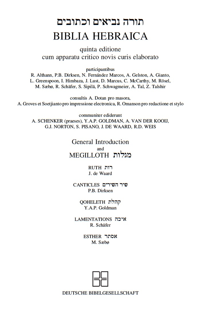 Biblia Hebraica Quinta (BHQ), Faszikel 18 (Megillot), Titelblatt (2004). Der Titel besagt Folgendes: a) Gesamttitel: (Hebräisch:) Tora, Propheten und Schriften. (Latein:) Die Hebräischen Bücher. Fünfte Ausgabe, mit kritischem Apparat neu ausgearbeitet, unter Beteiligung von R. Althann, P.B. Dirksen …, unter Beratung von A. Dotan für die Masora, A. Groves und Soetjianto für die elektronische Textverarbeitung, R. Omanson für Redaktion und Stil, haben gemeinsam herausgegeben A. Schenker (Vorsitzender), Y.A.P. Goldman, A. van der Kooij, G.J. Norton, S. Pisano, J. de Waard und R.D. Weis. b) Titel des Einzelhefts: (Englisch/Hebräisch:) Allgemeine Einleitung und Megillot (Festrollen). Ruth: J. de Waard; Hoheslied: P. B. Dirksen; Kohelet: Y. A. P. Goldman; Klagelieder: R. Schäfer; Esther: M. Sæbø